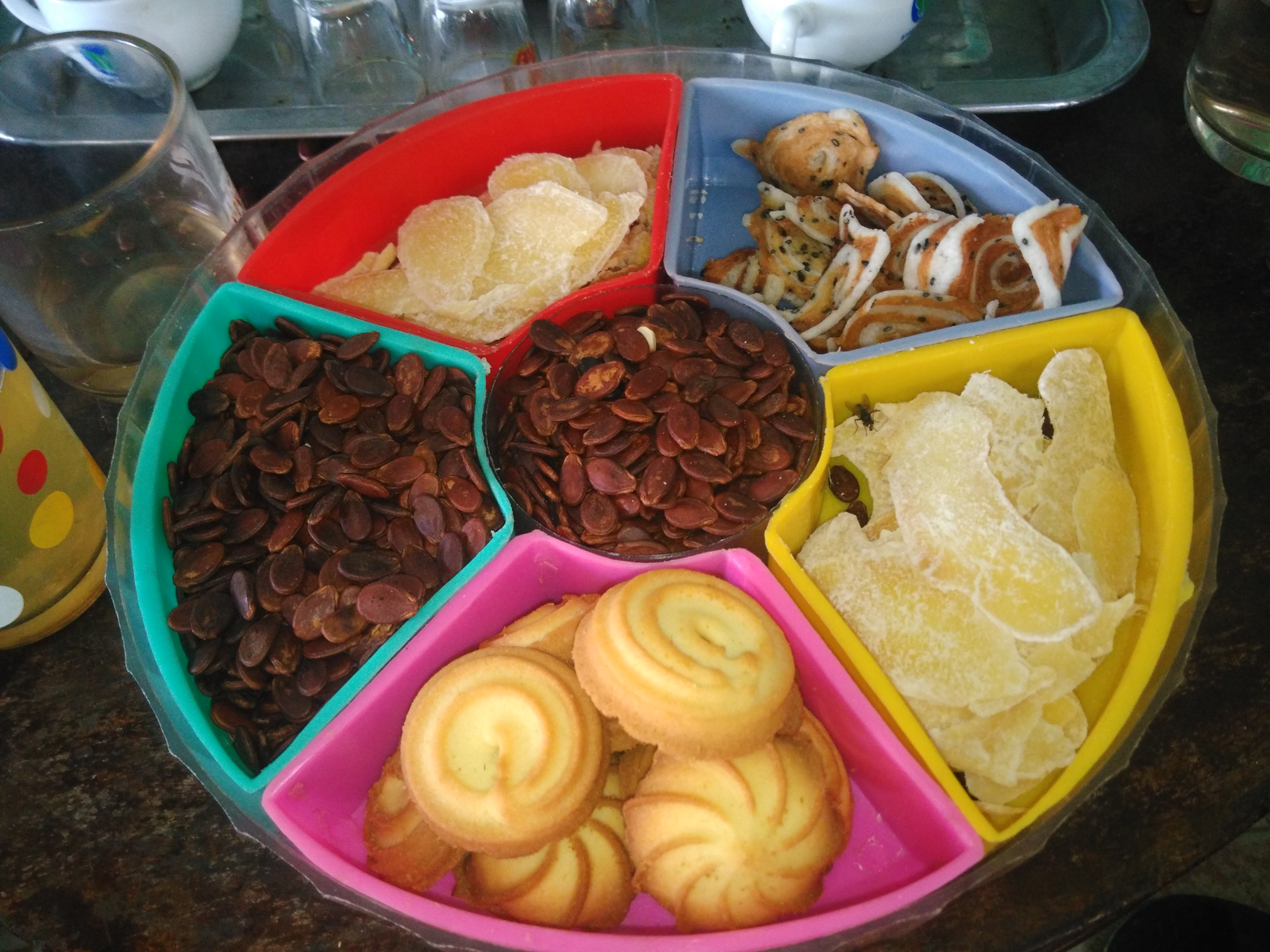 Hình tự chụp bằng máy ảnh cá nhân